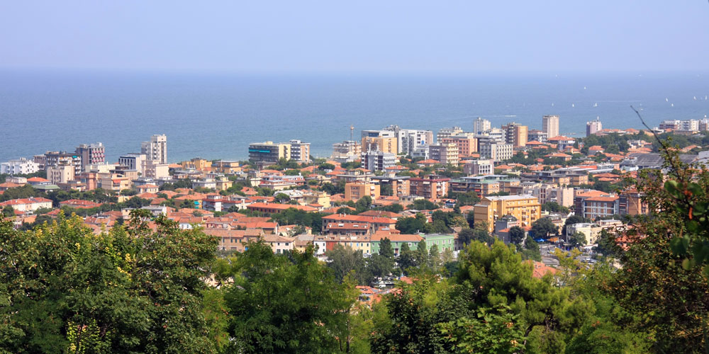 Panorama della zona nord di Pesaro